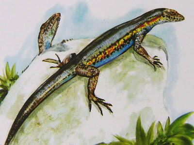 Retirado da pagina